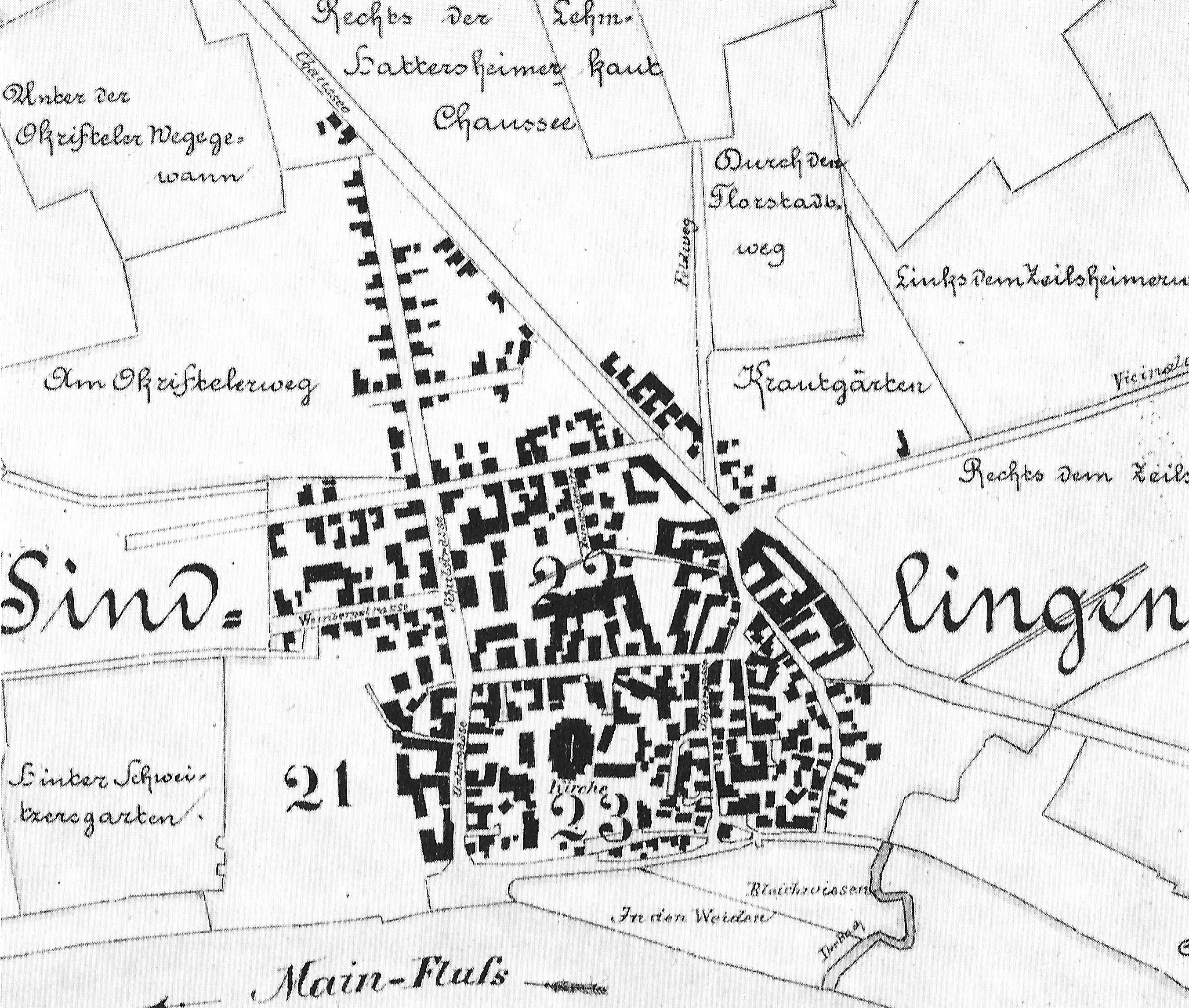 Ortsbebauung Sindlingen 1893